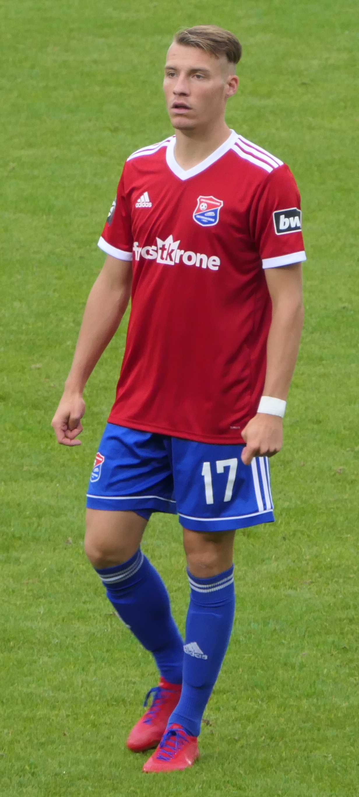 Der Fussballprofi Dominik Widemann im Trikot der SpVgg Unterhaching beim Heimspiel gegen Eintracht Braunschweig am 01.09.2018.